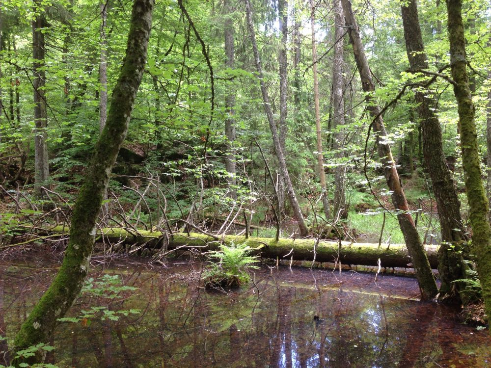 Ryggsåsen naturreservat